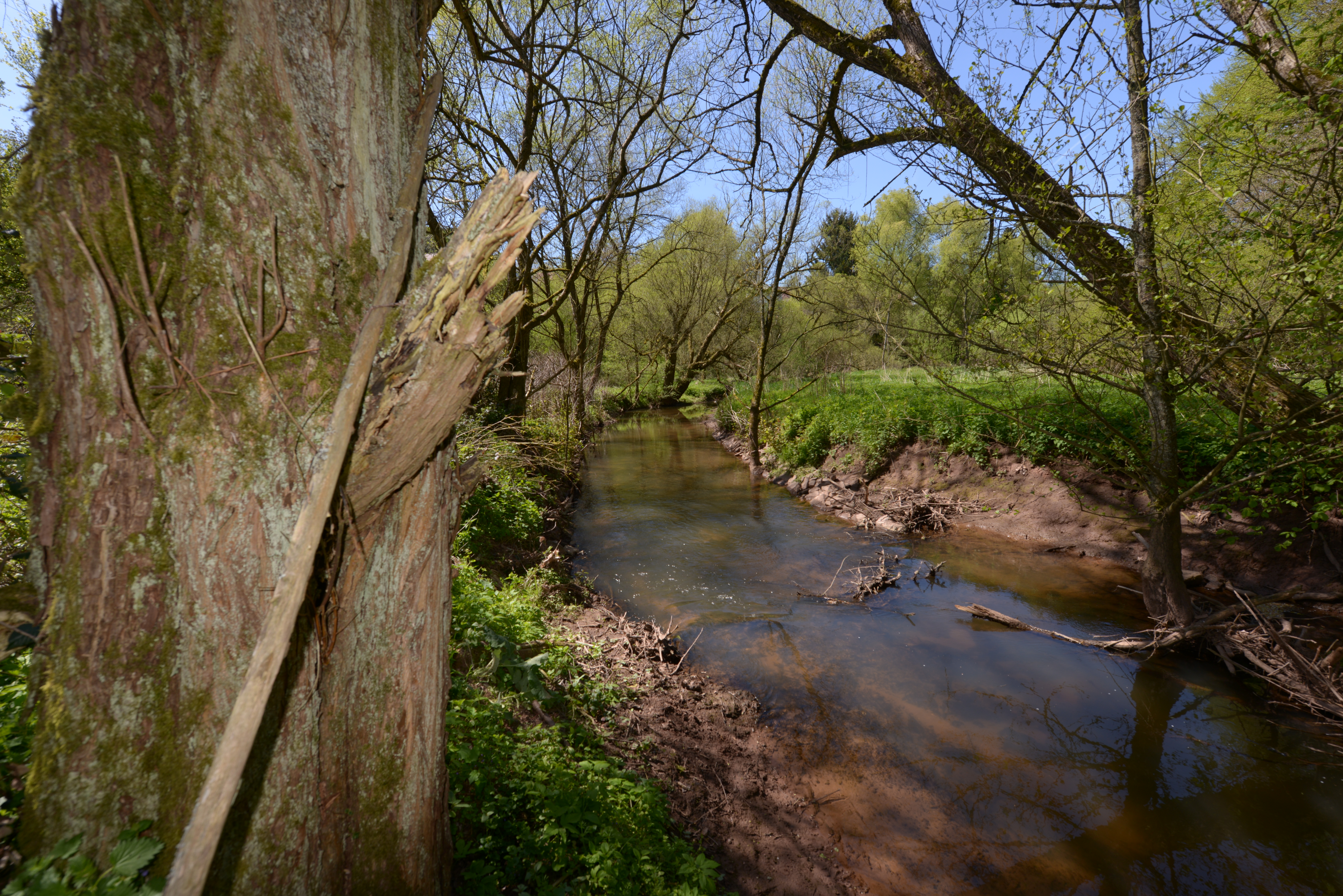 Täler der Ill und ihrer Nebenbäche: hier die Ill im Burgpark Illingen